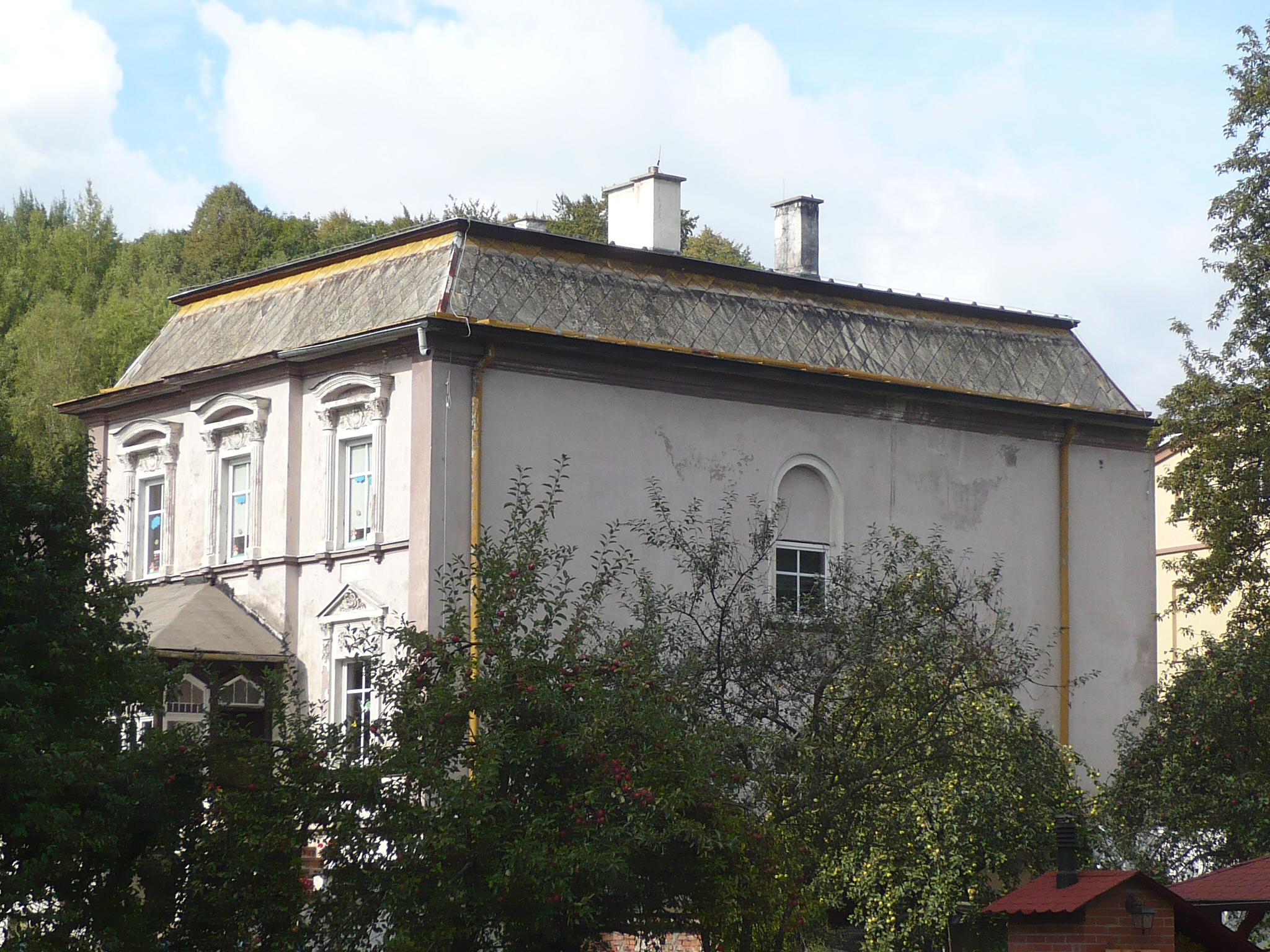 Włodowice, nr 50